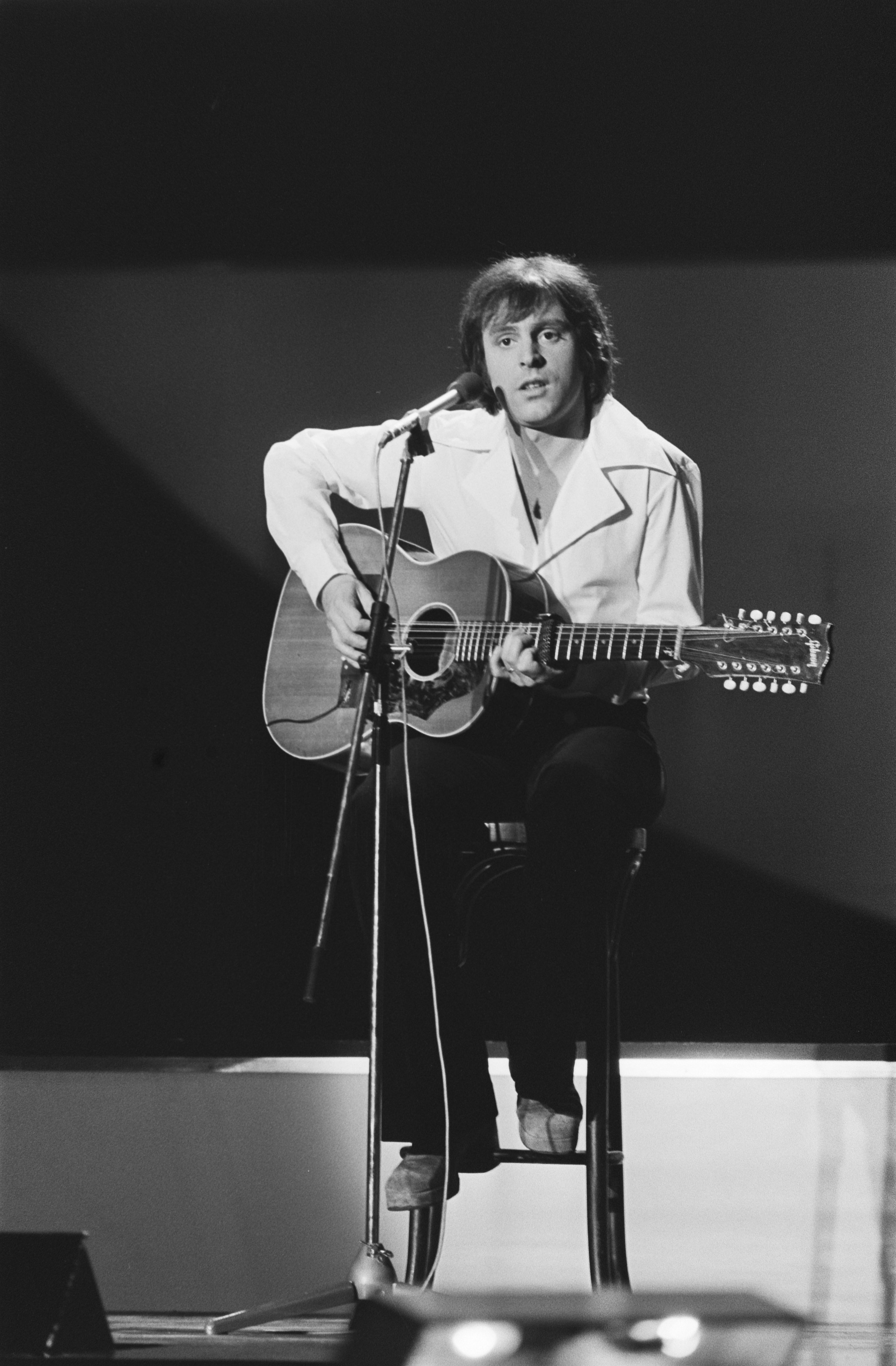 Collectie / Archief : Fotocollectie Anefo Reportage / Serie : [ onbekend ] Beschrijving : Eurovisie Songfestival 76 Den Haag ; Pierre Rapsat (Belgie) Datum : 3 april 1976 Locatie : België, Den Haag Trefwoorden : songfestivals Persoonsnaam : Eurovisie Songfestival Fotograaf : Mieremet, Rob / Anefo Auteursrechthebbende : Nationaal Archief Materiaalsoort : Negatief (zwart/wit) Nummer archiefinventaris : bekijk toegang 2.24.01.05 Bestanddeelnummer : 928-5032